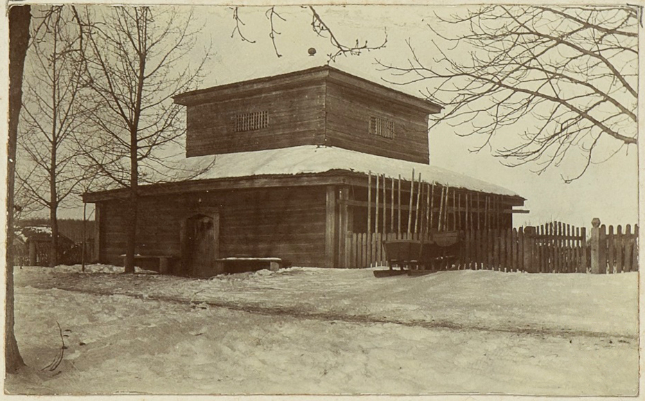 Беларуская (тарашкевіца): Карма (Karma), Стэфанаў (Stefanaŭ). Лядоўня